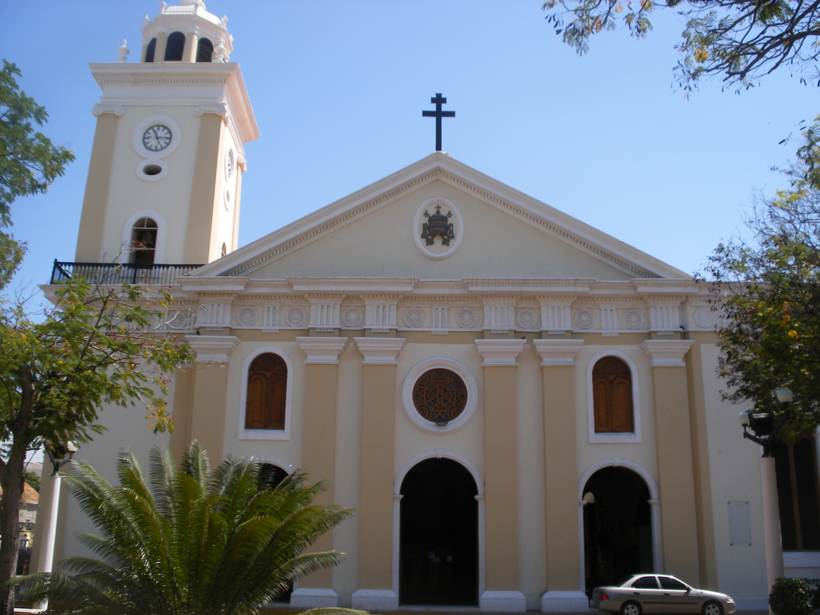 Fachada de la Santa Iglesia Catedral de los Bienaventurados Apóstoles San Pedro y San Pablo, Maracaibo (Zulia - Venezuela).